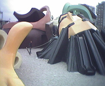 Parque Gulliver, Valencia (España) - Detalle